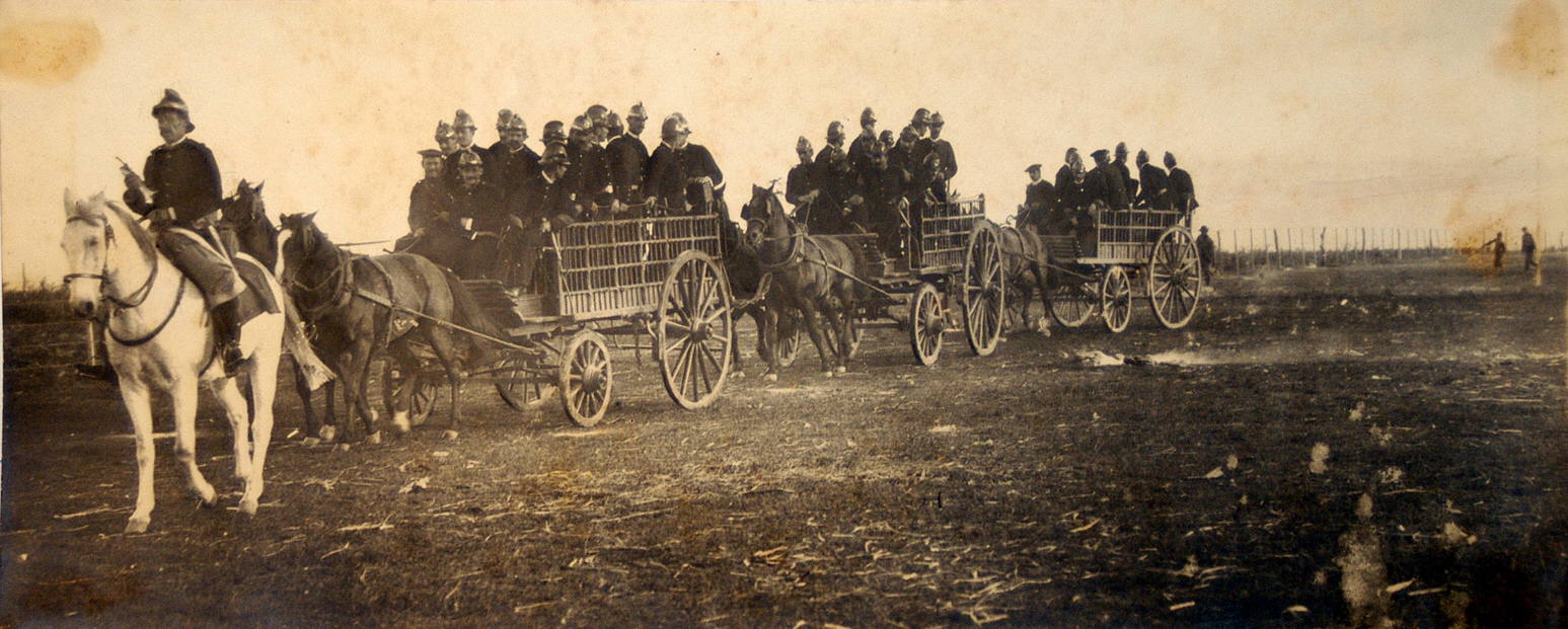 Fotografía de fuerzas del ejército gubernamental siendo transportadas en carretas, en el marco de la revolución de 1904 en Uruguay.